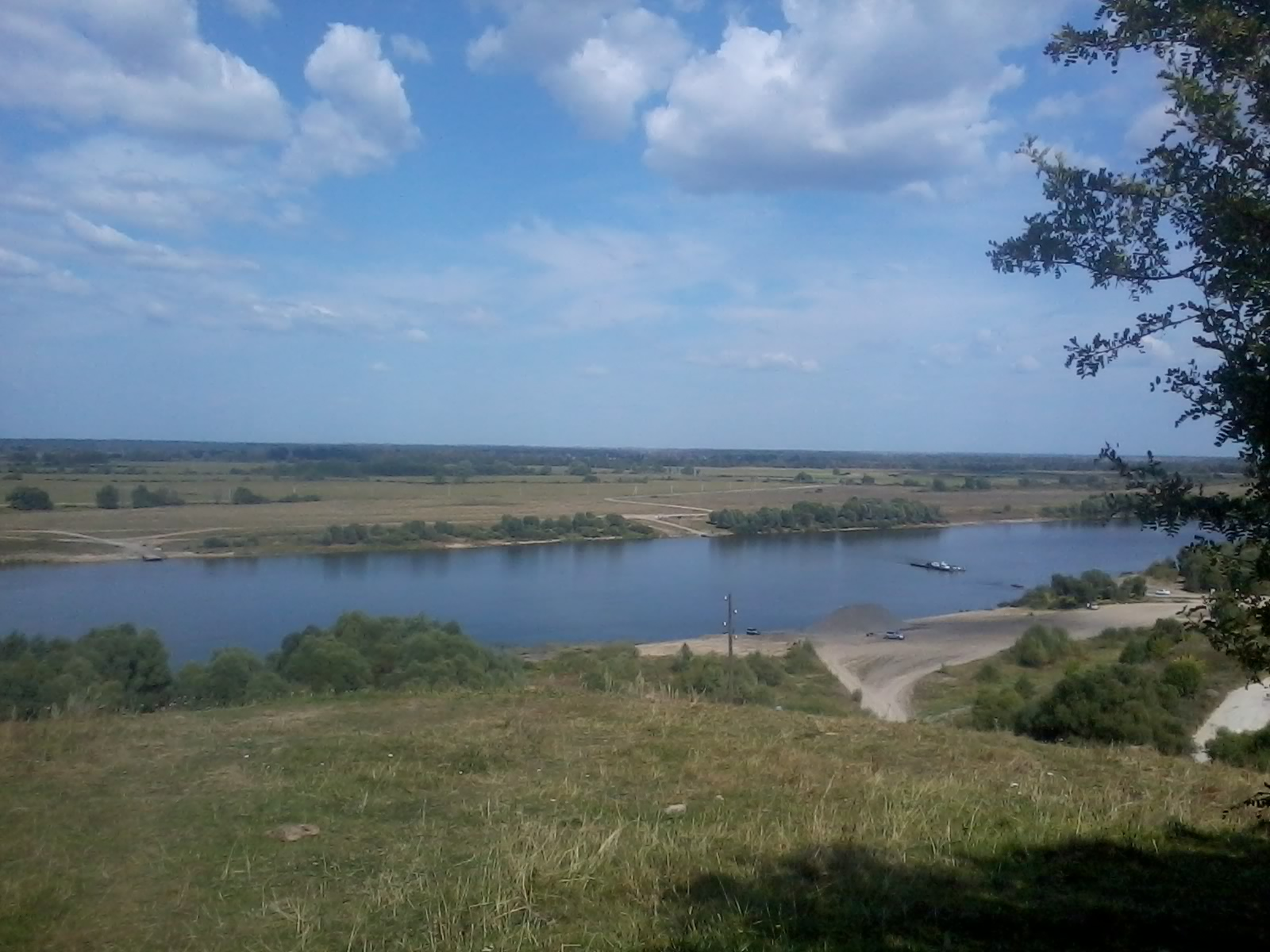 Река Ока